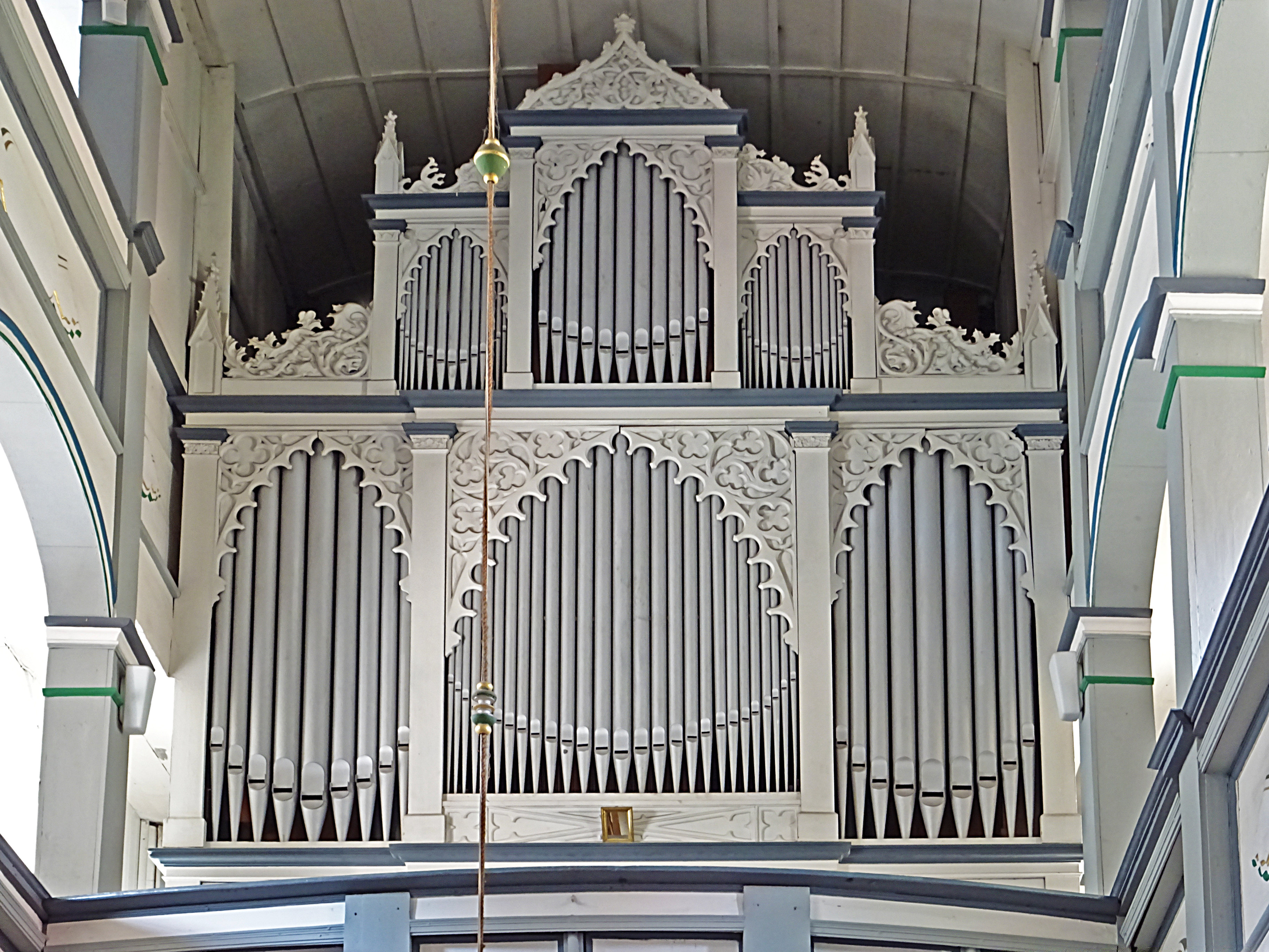 Orgel von Johann Friedrich Schmidt (Gaberndorf, 1861, II/P16) in der Dorfkirche Ammerbach